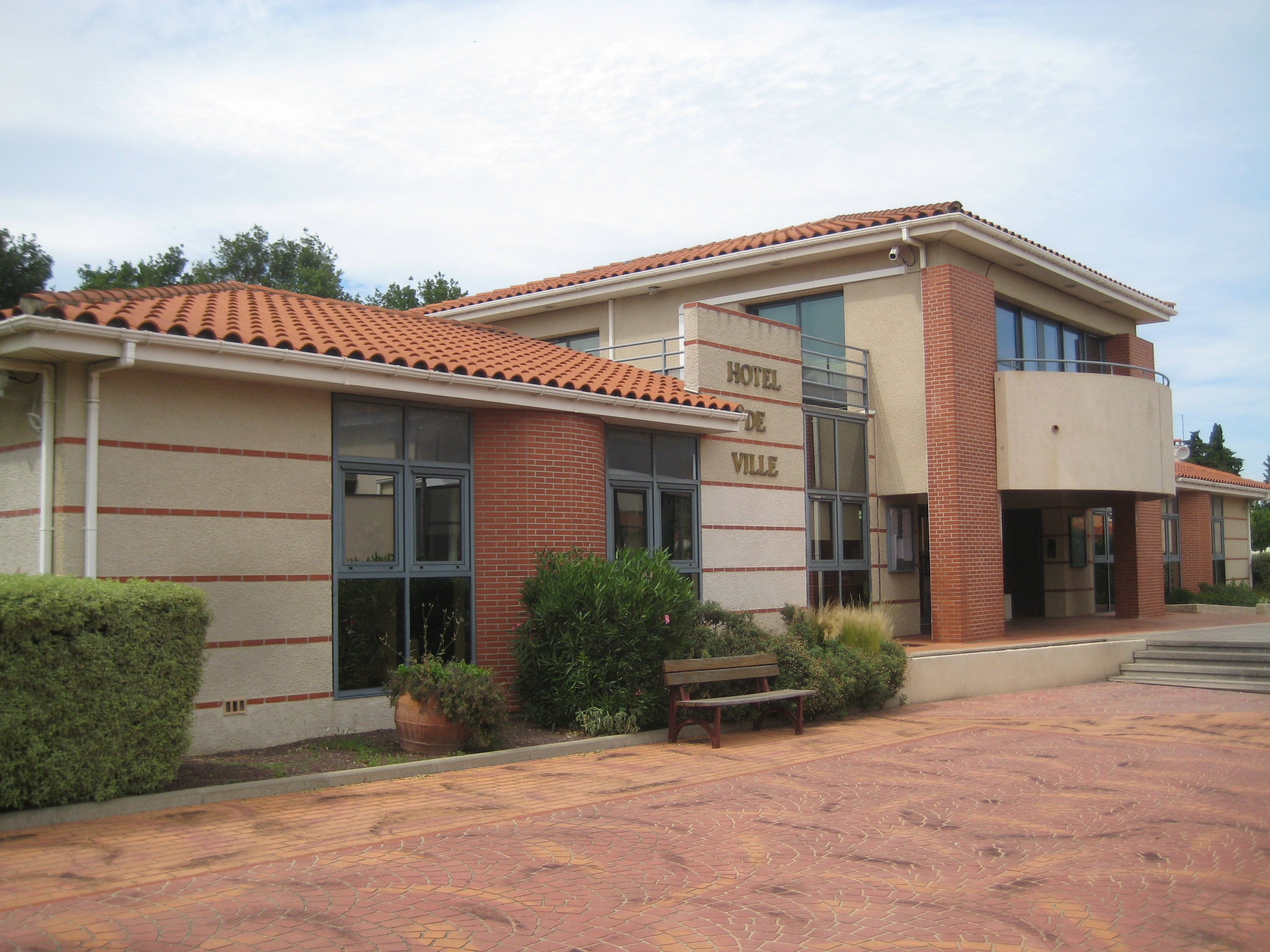 Mairie de Pollestres